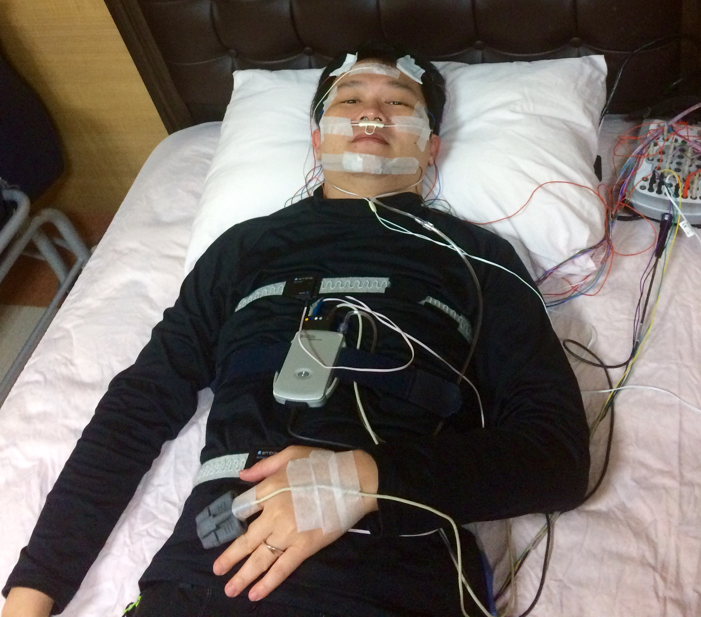 中文（台灣）: 多項生理睡眠檢查的受試者，以及全身所黏貼的感應器